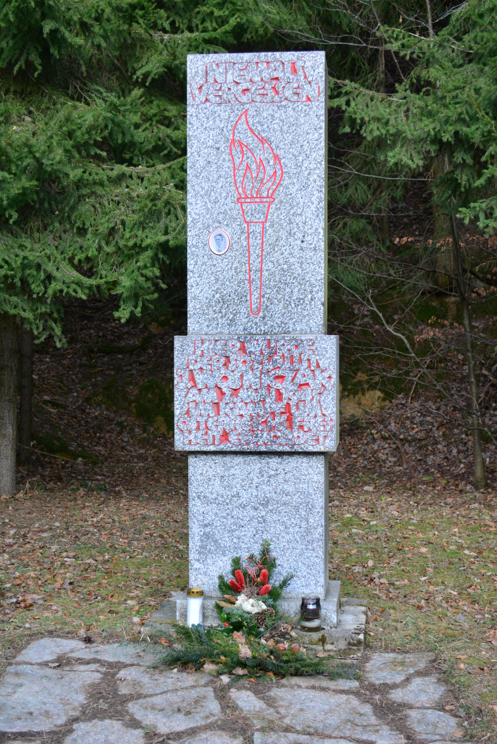 Gedenkstätte für NS-Opfer (Mödring, Isidor_Wozniczak (1892-1945))